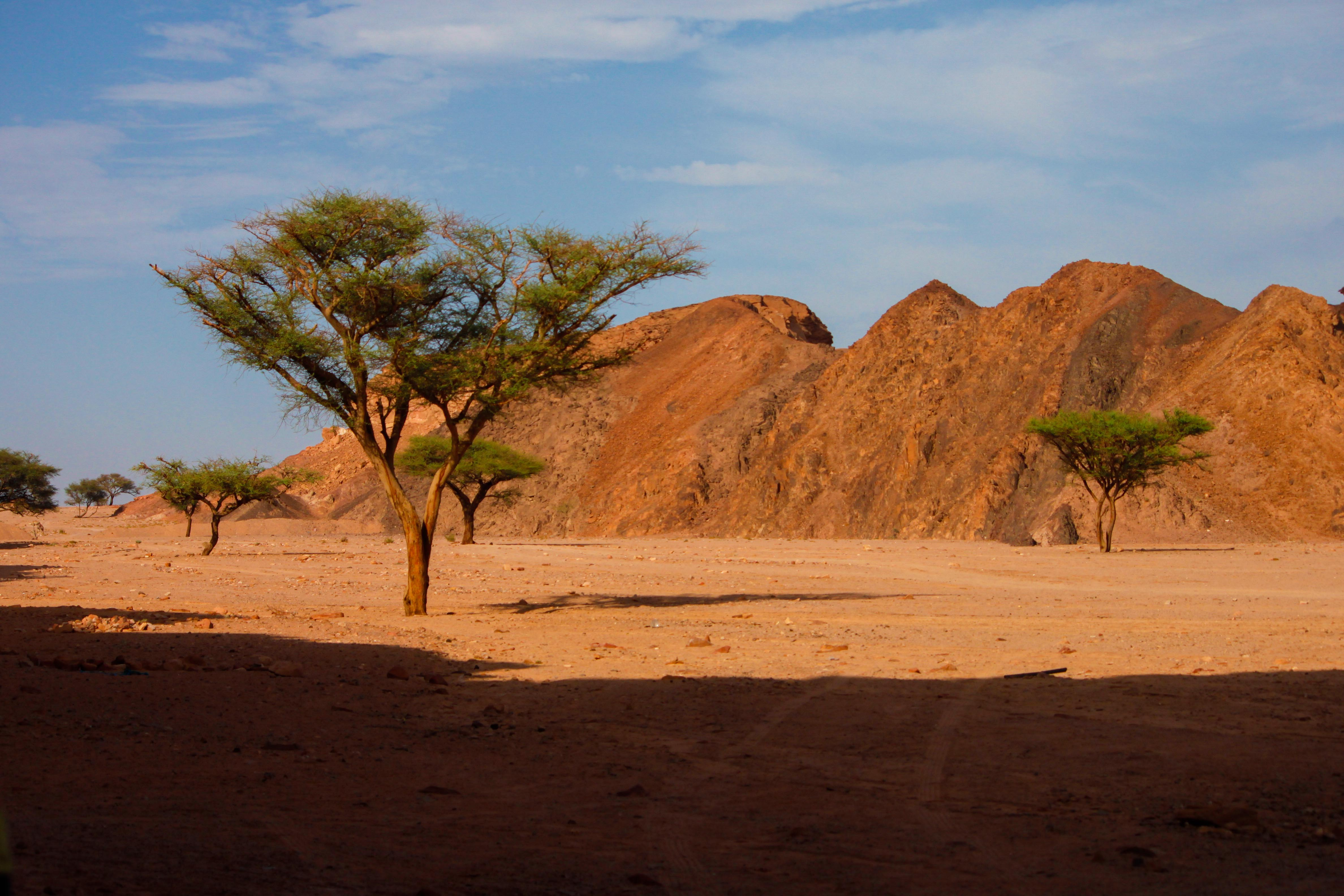 تاور ديسكو ، منطقة باحد وديان جنوب سيناء ، مصر